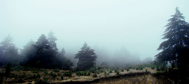 el real del monte